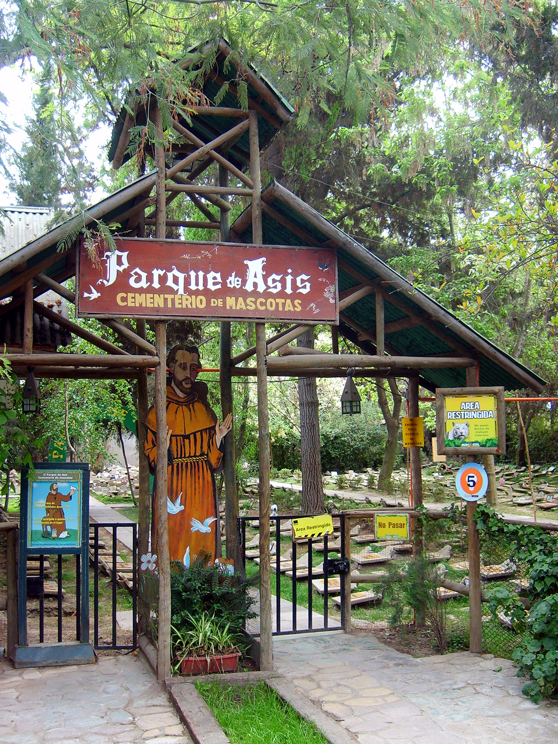 Entrada al Parque de Asís, cementerio de mascotas ubicado a un costado del zoológico Buin Zoo en la comuna de Buín, Chile.